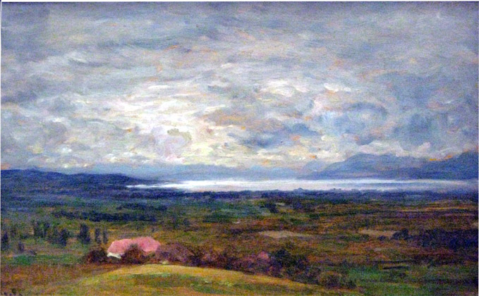 Wilhelm Steinhausen, Landschaftsstudie, Tagebücher 1909